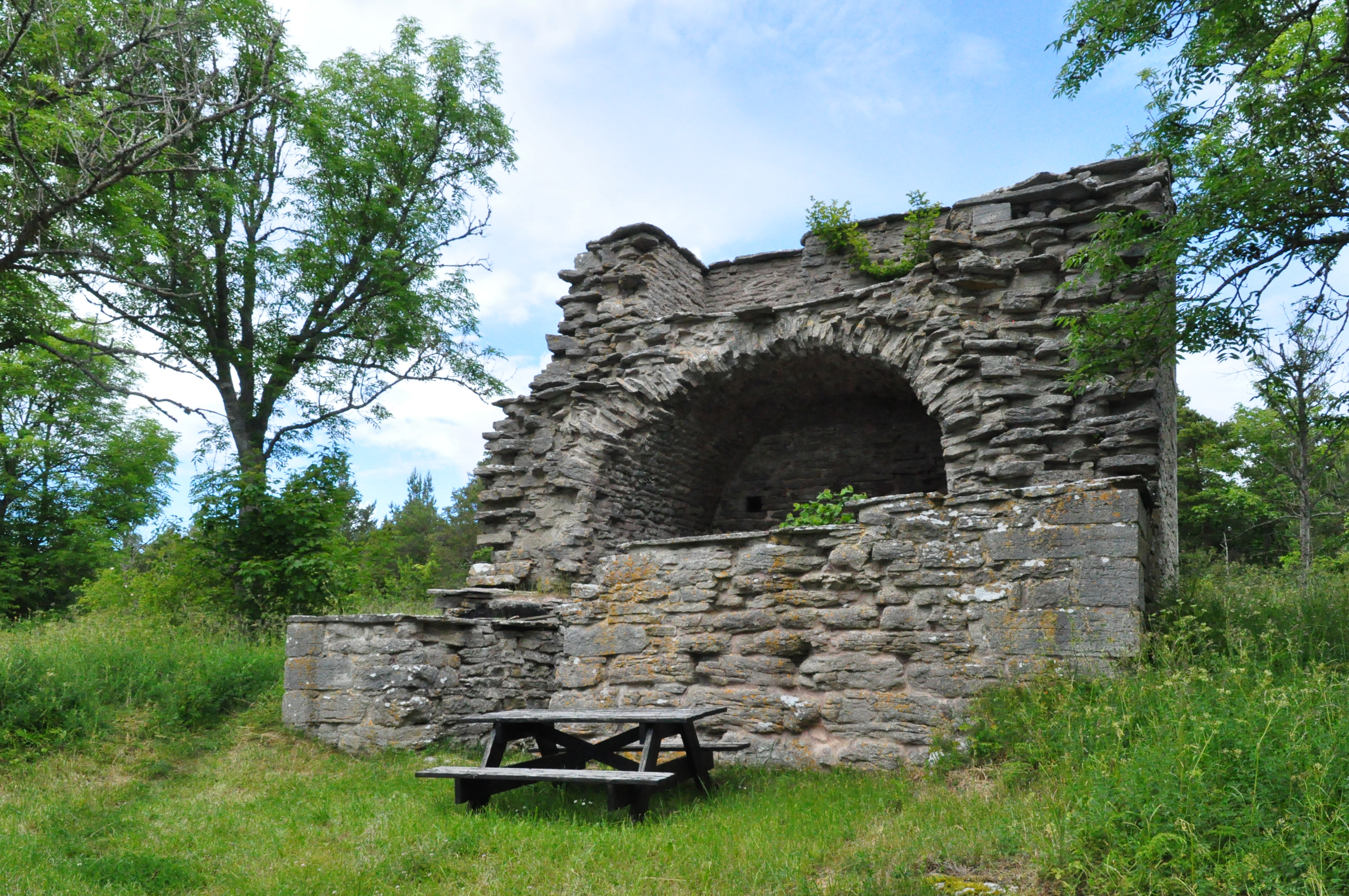 Det så kallade mynttornet (kastalen9 vid Fardume "slott" 8borg), Raä-nummer Rute 4:1, Gotland.